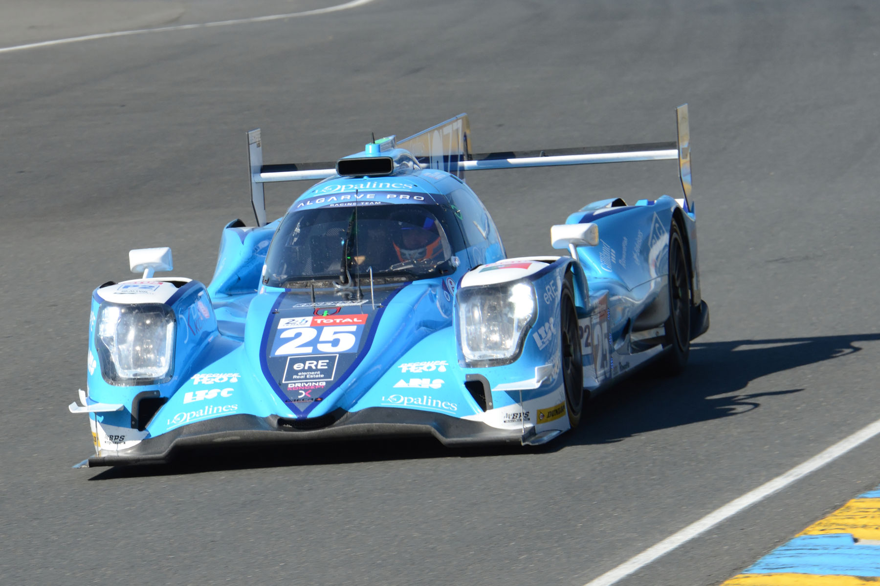 L'Oreca 07 de l"écurie Algarve Pro Racing pilotée par David Zollinger, Andrea Pizzitola et John Falb aux 24 Heures du Mans 2019